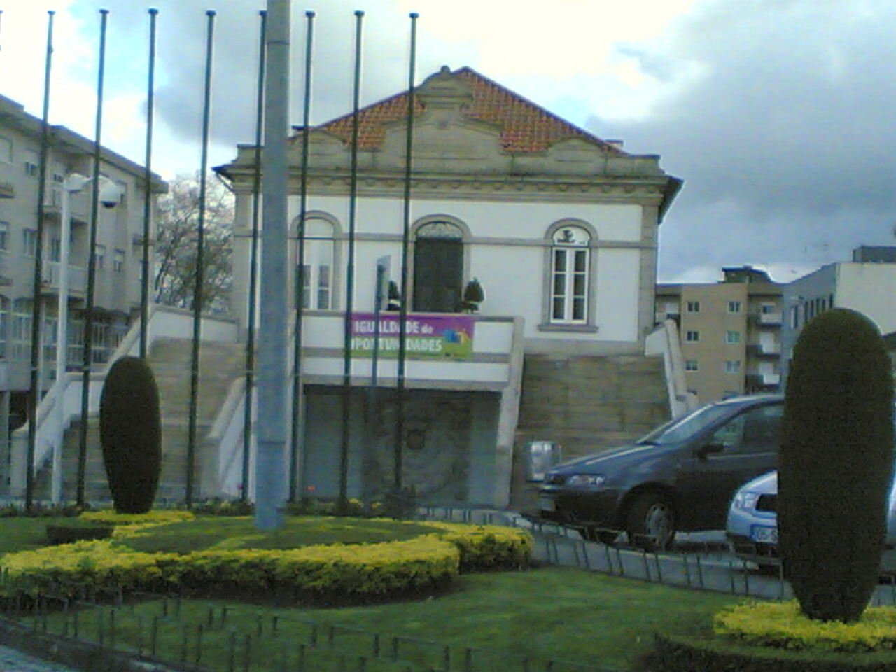 Paços do Concelho português de Lousada.